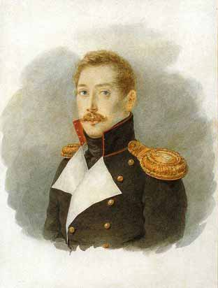 Портрет графа Ивана Петровича Коновницына (1806-1867)